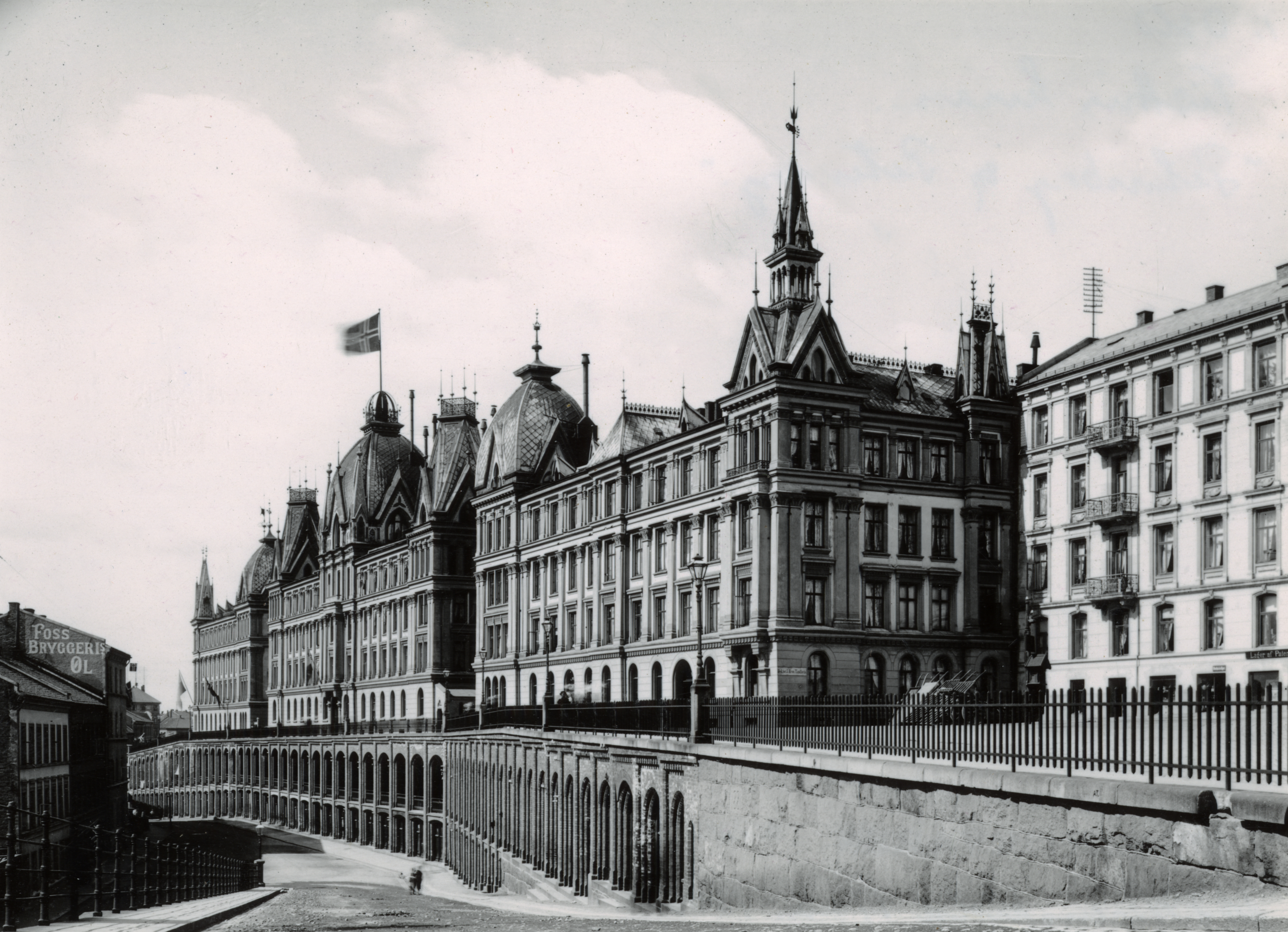 Victoria Terrasse i Oslo, Oslo 17. mai 1900 Victoria Terrasse med Ruseløkkbasarene